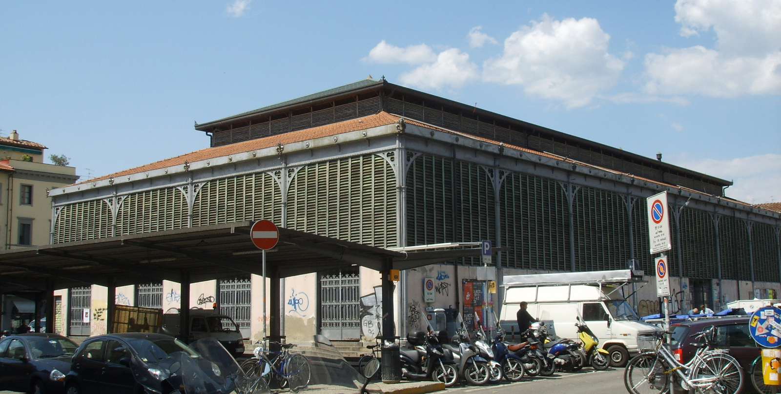 Mercato di sant'ambrogio